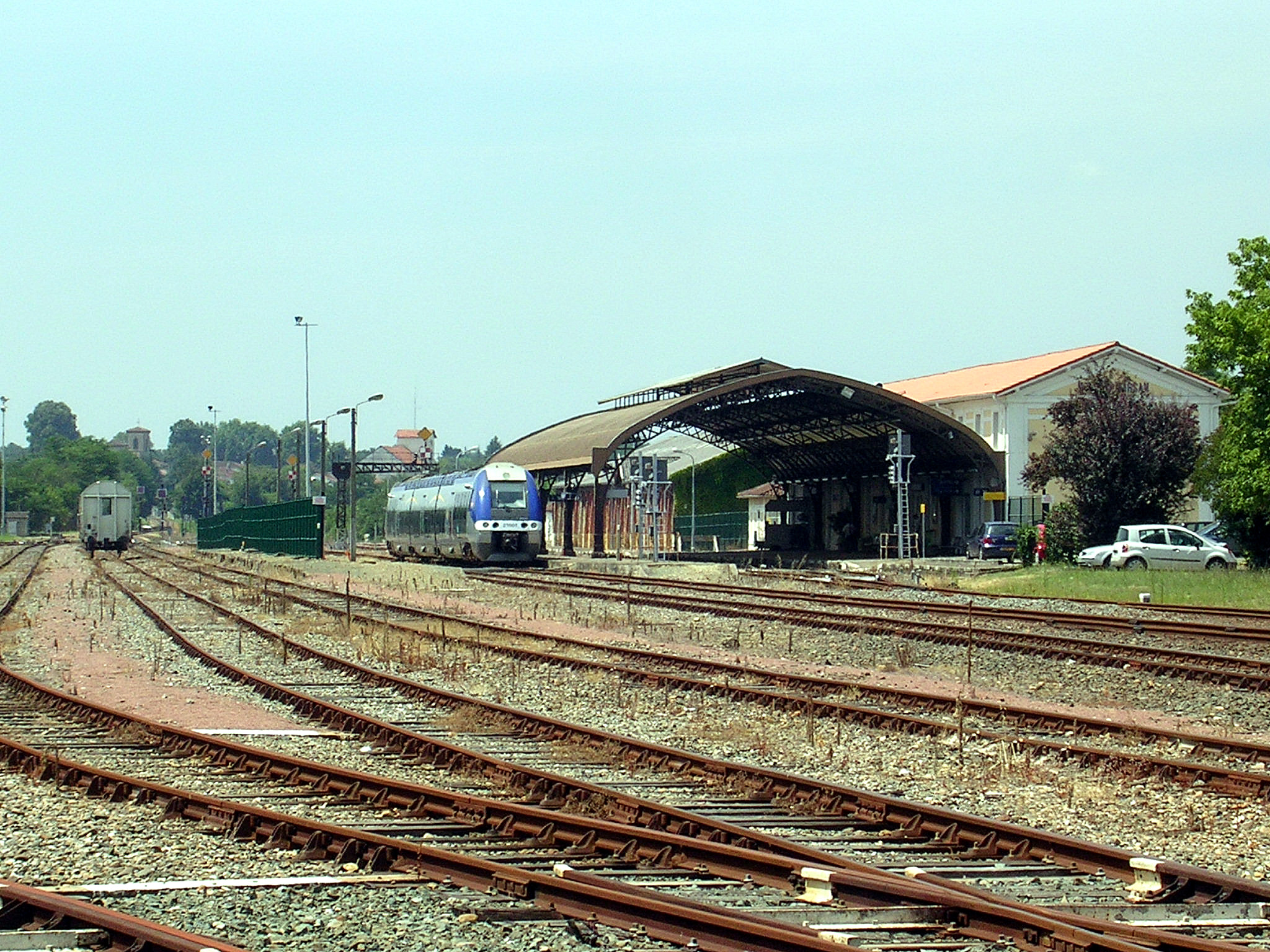 Gare de Mont-de-Marsan, Landes, France. Le TER Aquitaine est en gare. On aperçoit le clocher de l'église de Saint-Pierre-du-Mont en arrière plan